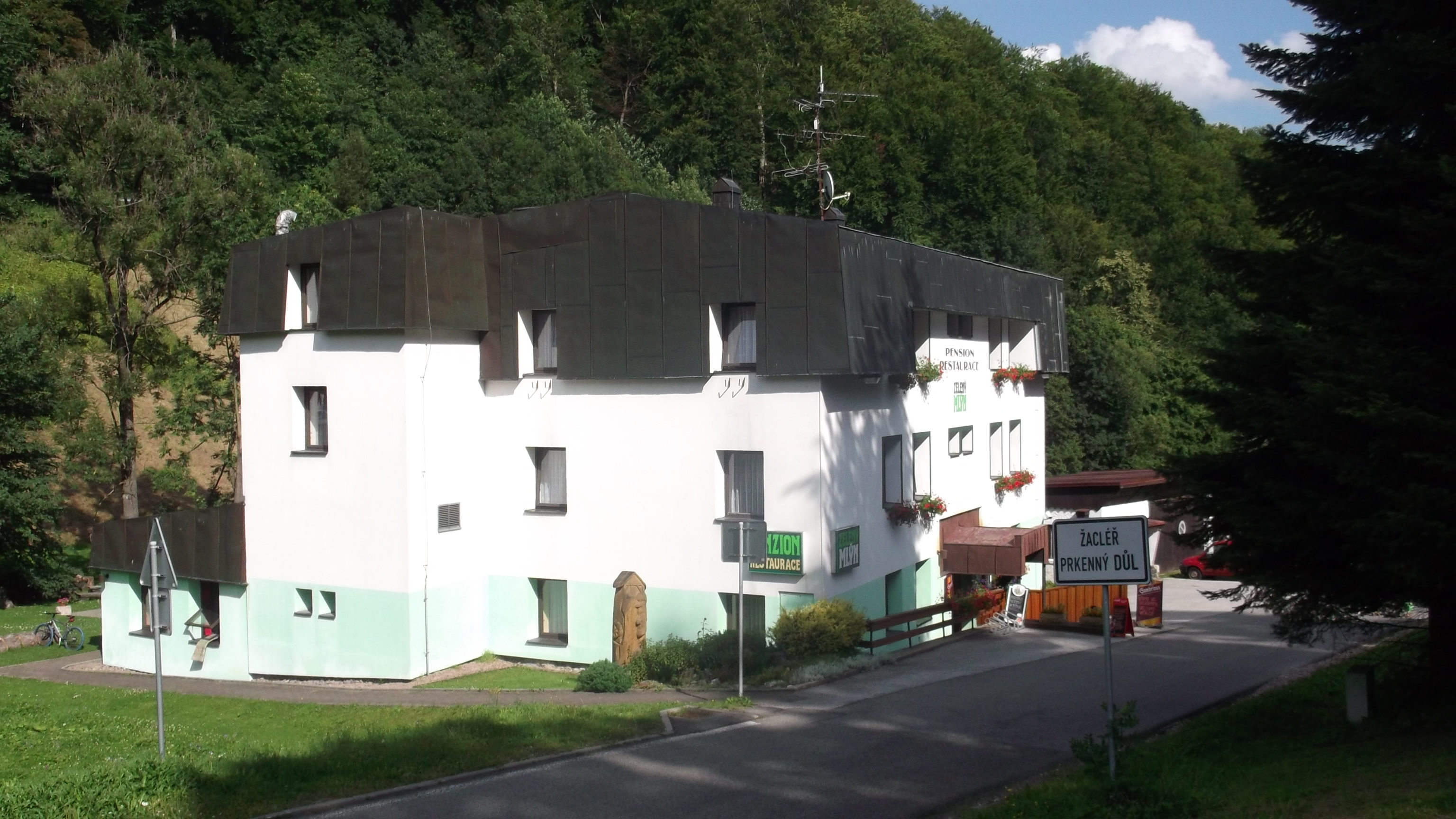 Zaclerz, Drewniana Dolina